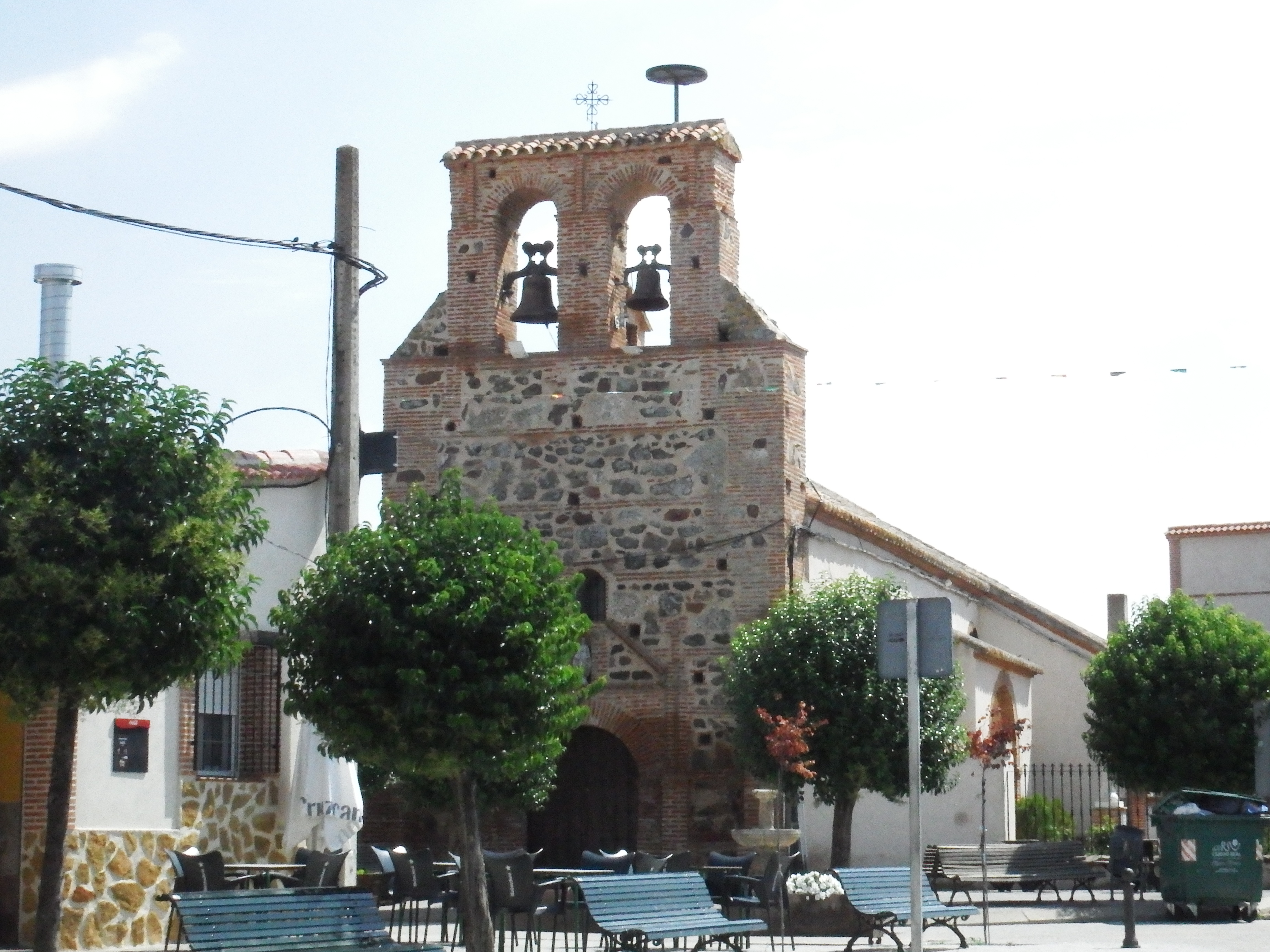 Cabezarados, detalle espadaña de la iglesia.